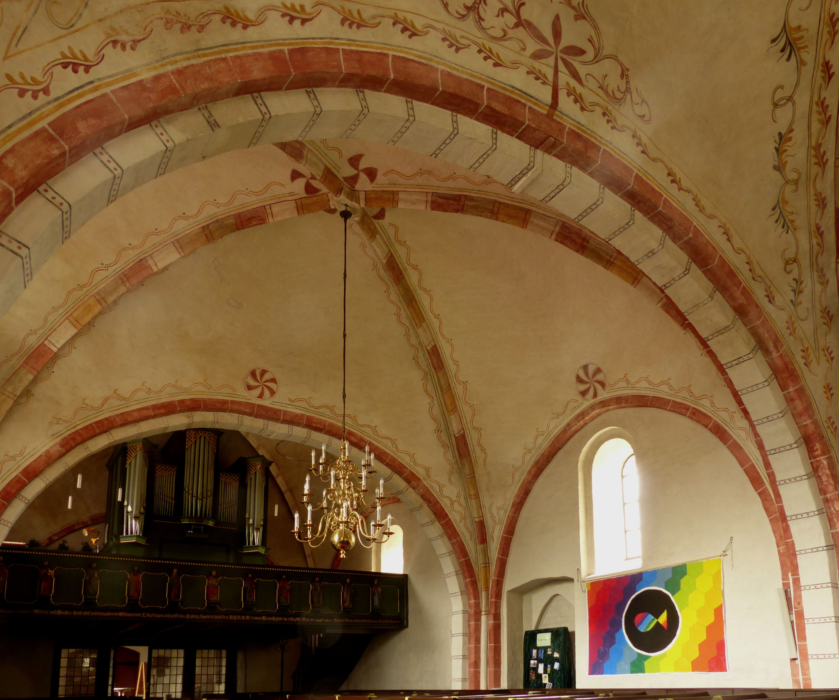 Innenraum der Pankratiuskirche in Stuhr, 13. Jahrhundert